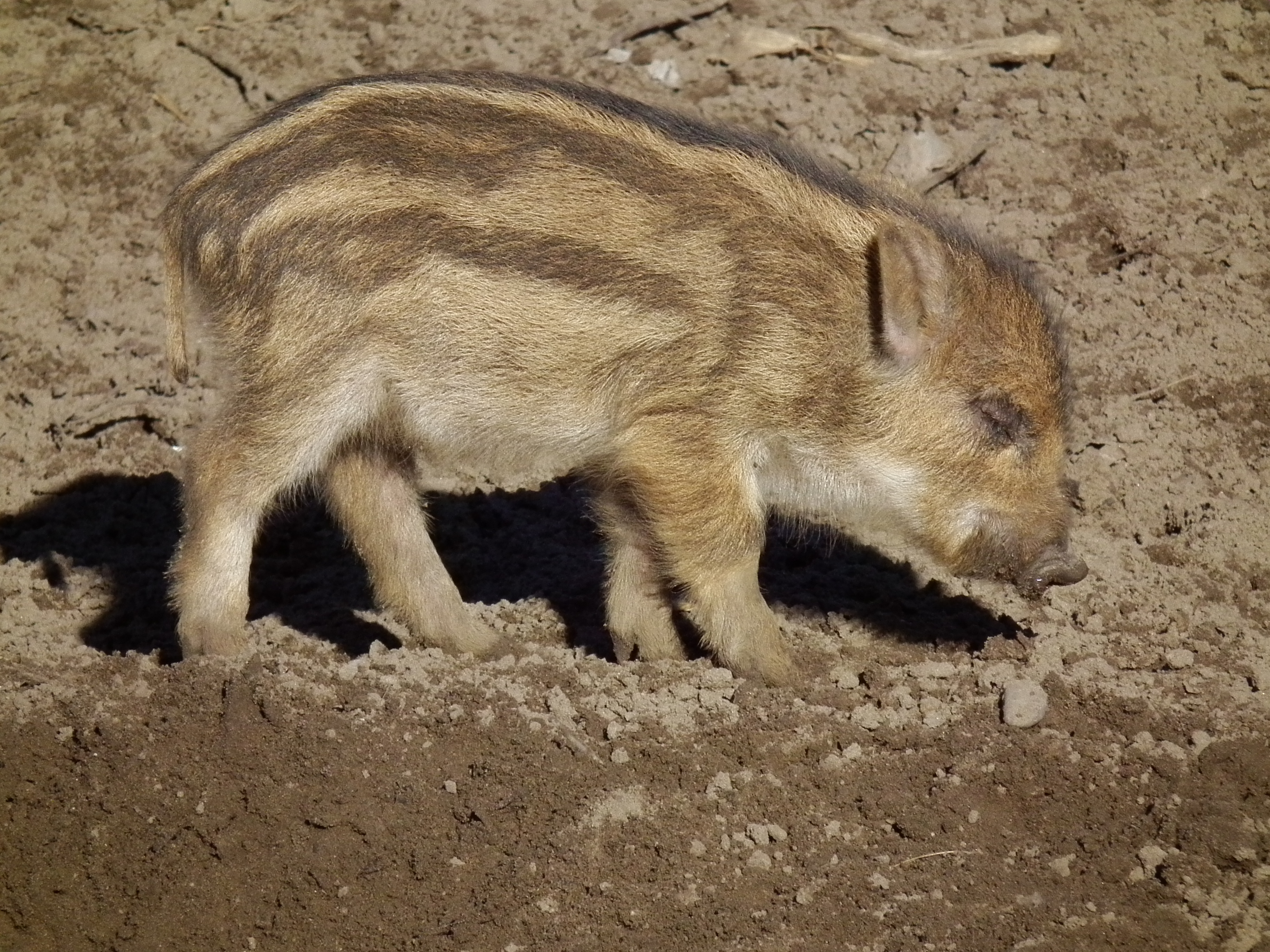 Wildschweinfrischling (Sus scrofa) im Alter von circa zwei Wochen, fotografiert im Wildgehege Rheinauer Wald (Mannheim, Baden-Württemberg, Deutschland).